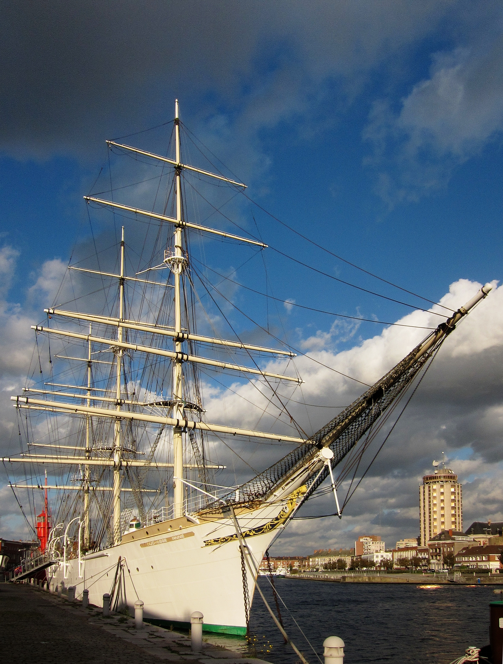 Le Duchesse Anne au musée portuaire de Dunkerque.